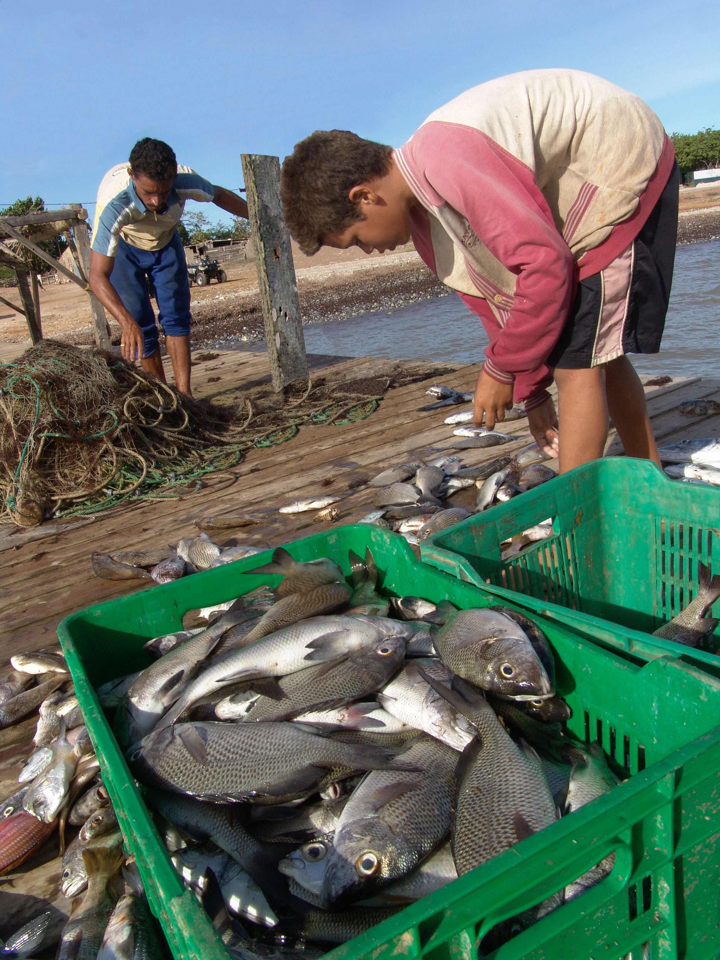 Pescadores_de_La_Uva